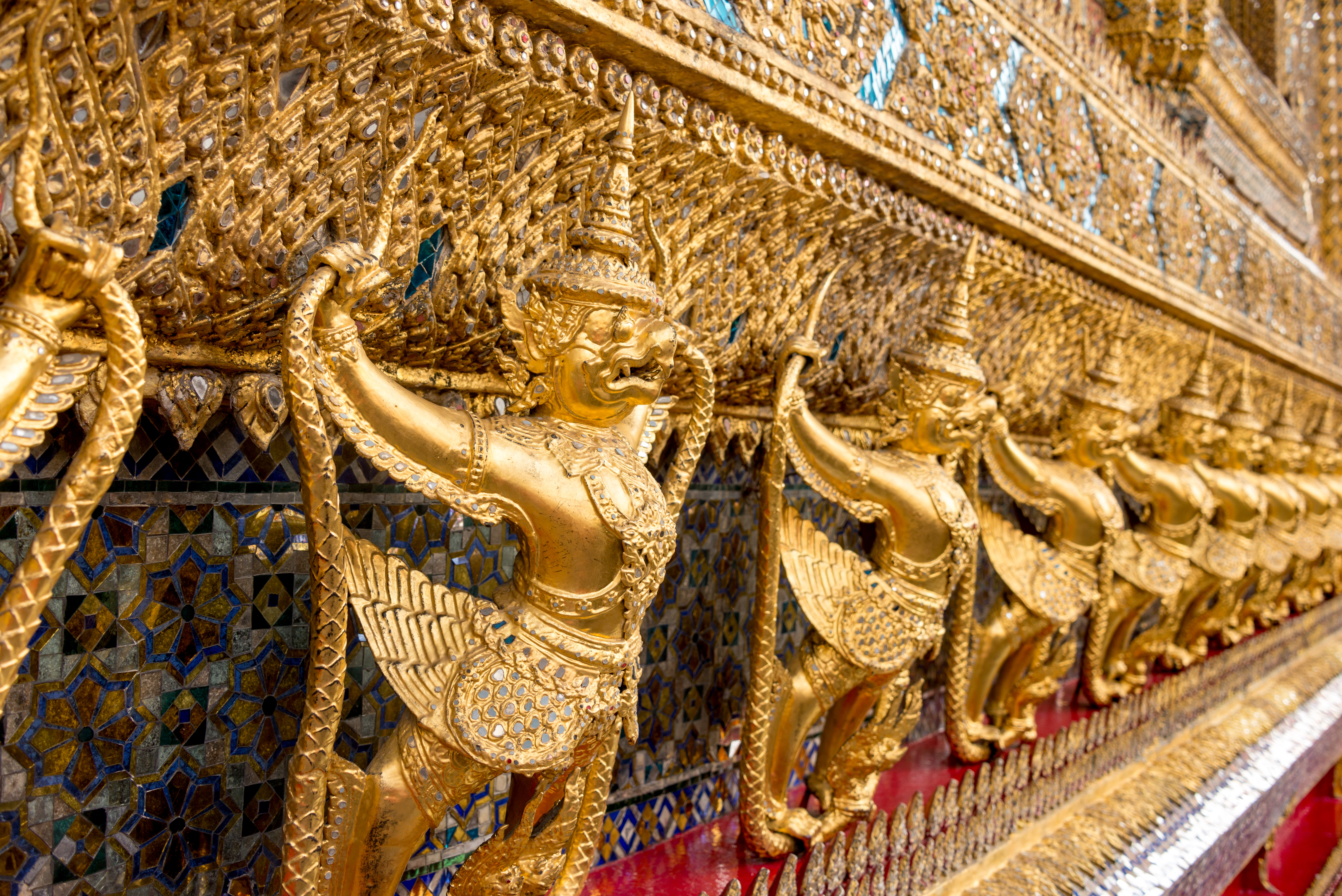 Garudas at Wat Phra Kaew, Bangkok